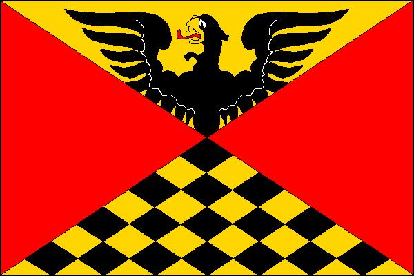 Vlajka obce Nová Dědina (okres Kroměříž)